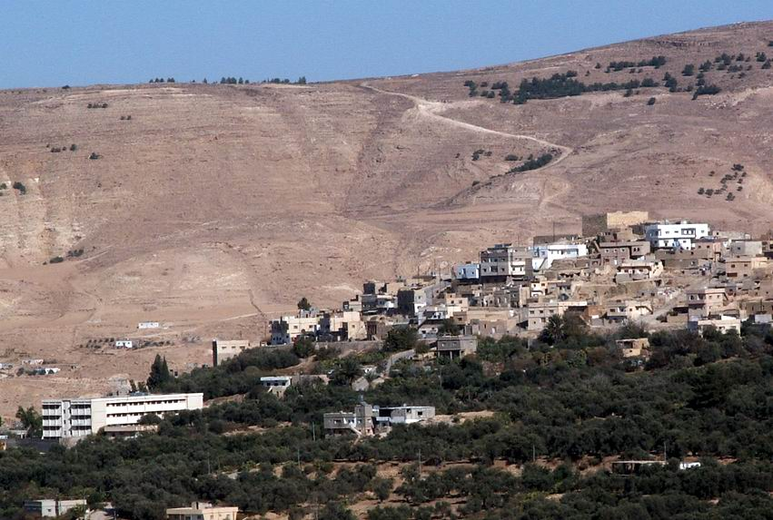 המבנה המרובע ללא החלונות על ראש הגבעה הוא מצודת תופל, ממש בתוך בתיה של העיר המודרנית photo by Uri Juda